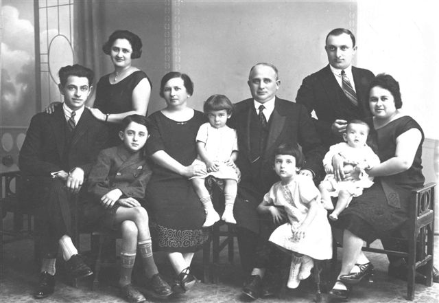 משפחת יעקב פרלשטיין